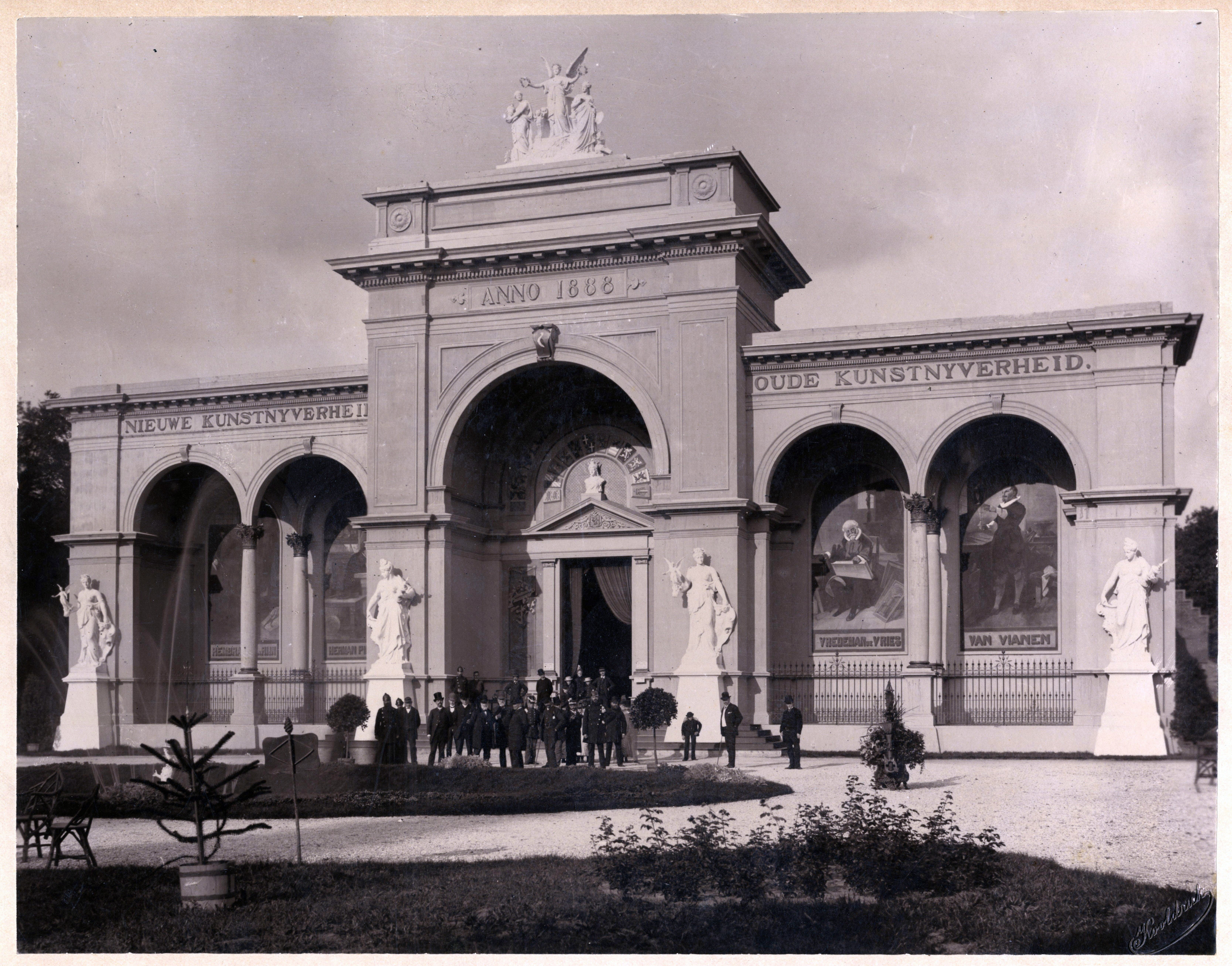 Hoofdgebouw Nationale Tentoonstelling Oude en Nieuwe Kunstnijverheid 1888, op de Koekamp in Den Haag.